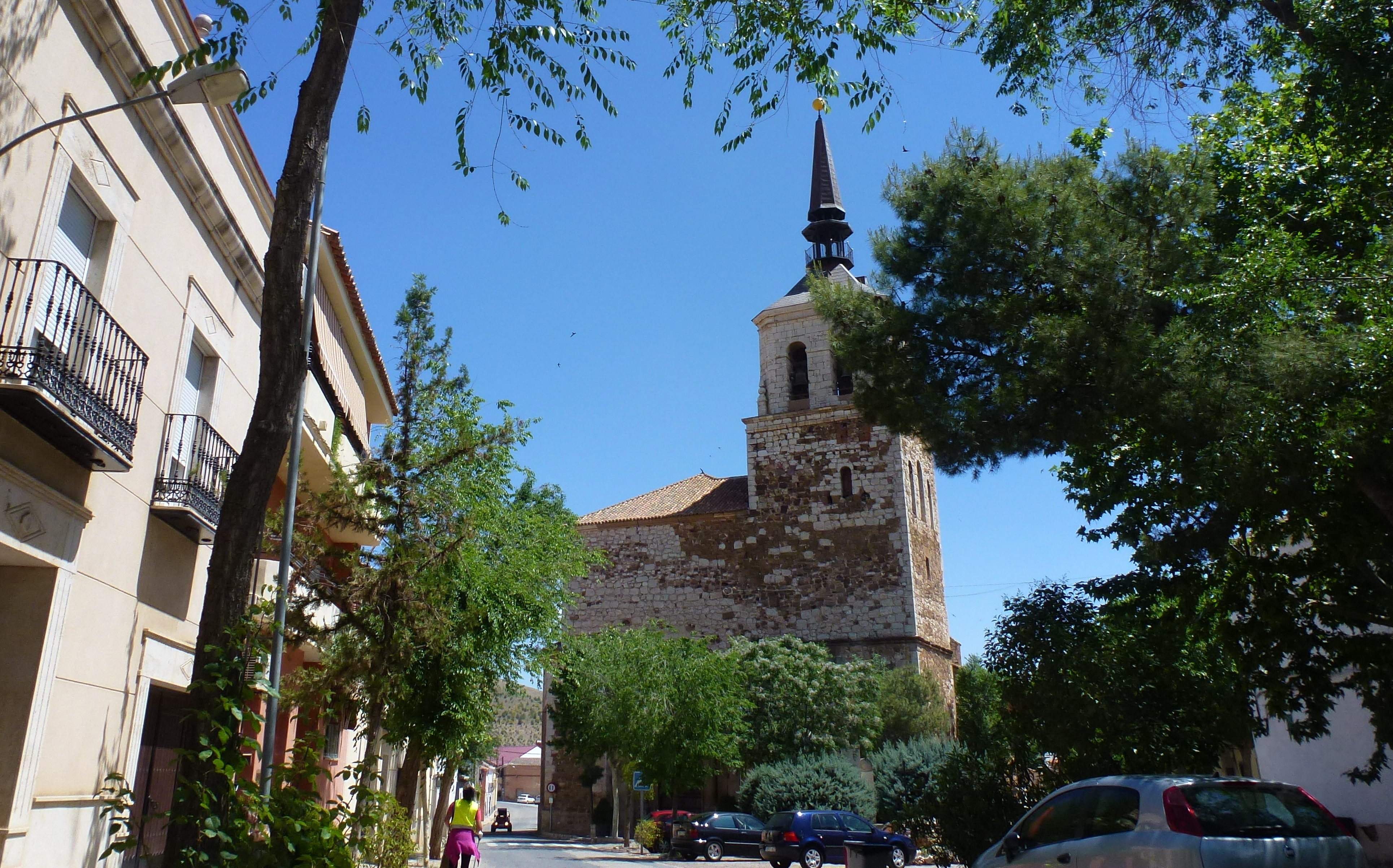 Santa Cruz de Mudela